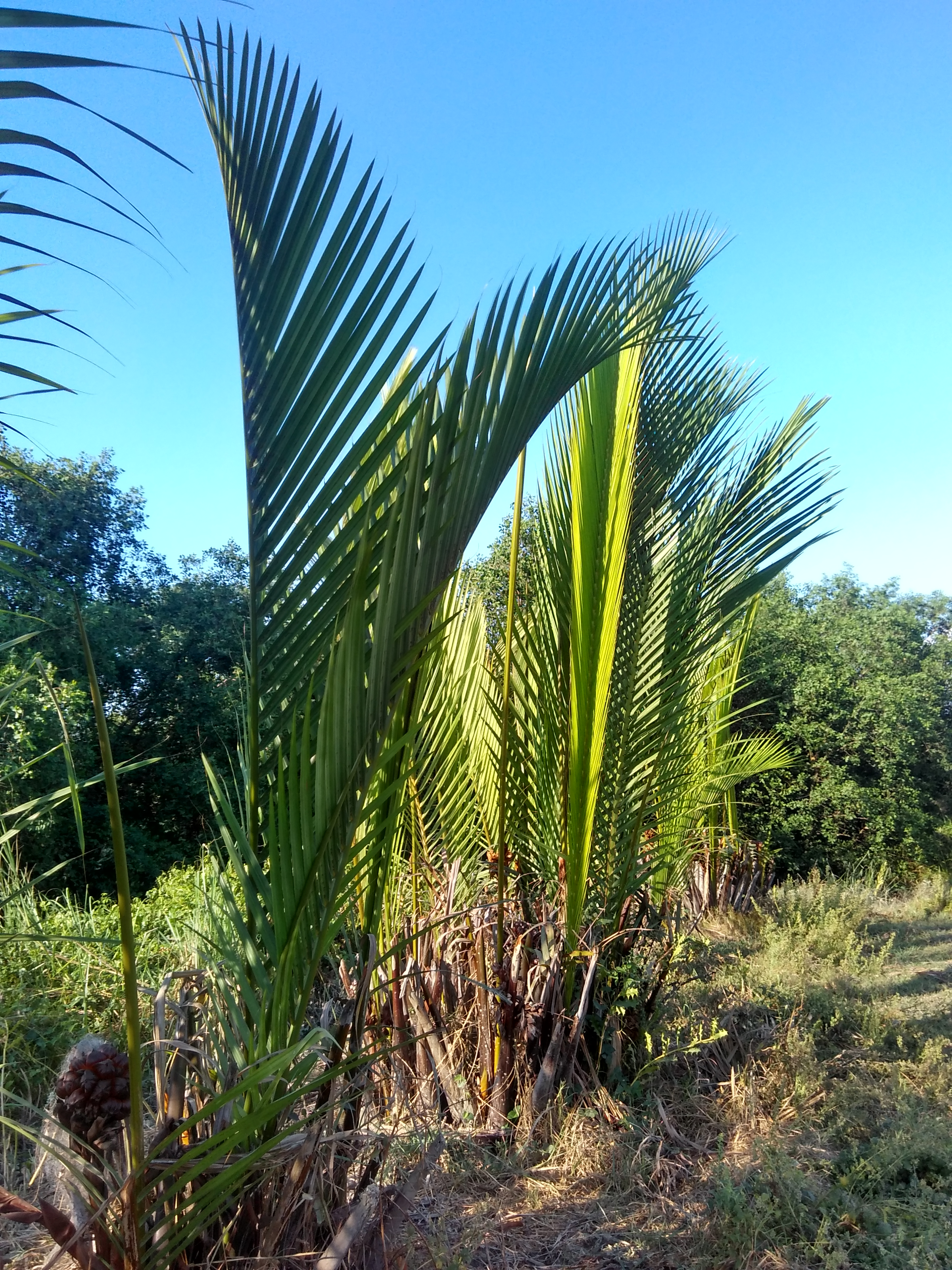 မြန်မာဘာသာ: ချောင်းစပ်မှ ဓနိပင်များ